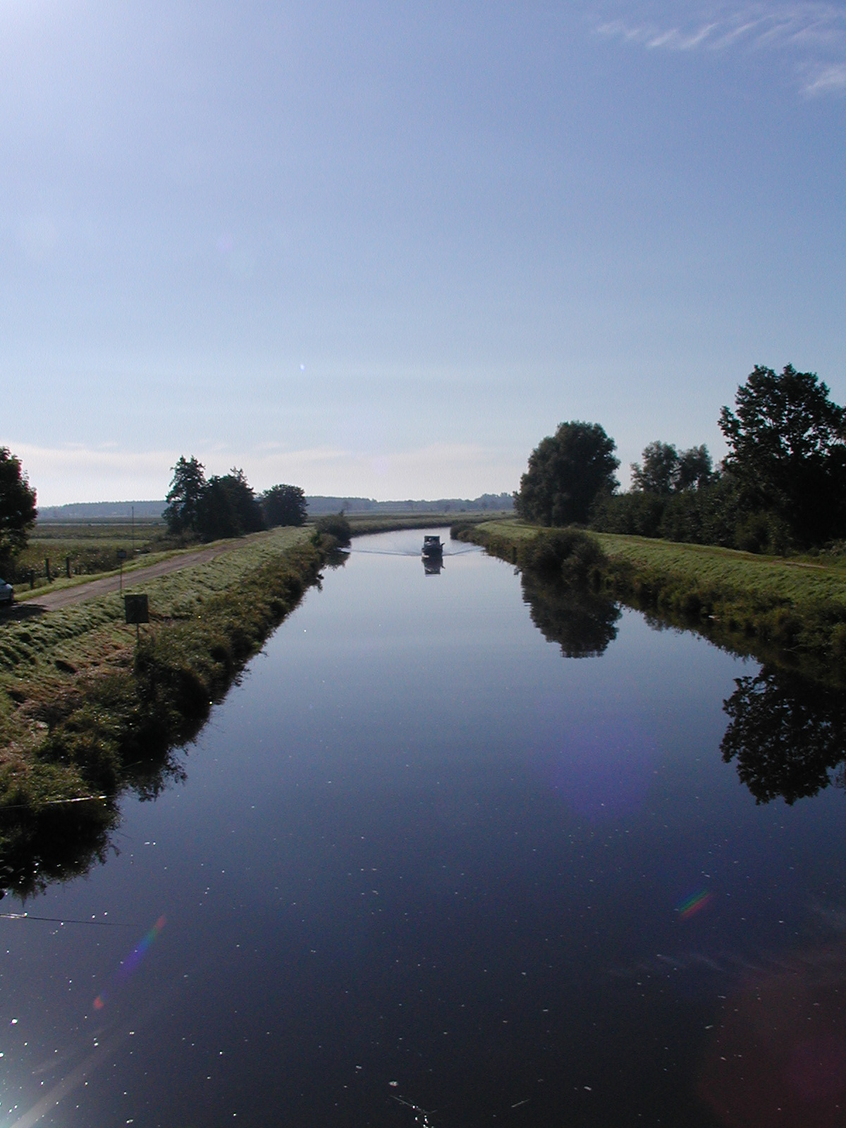 Der Hadlerkanal in Osten Richtung Süden